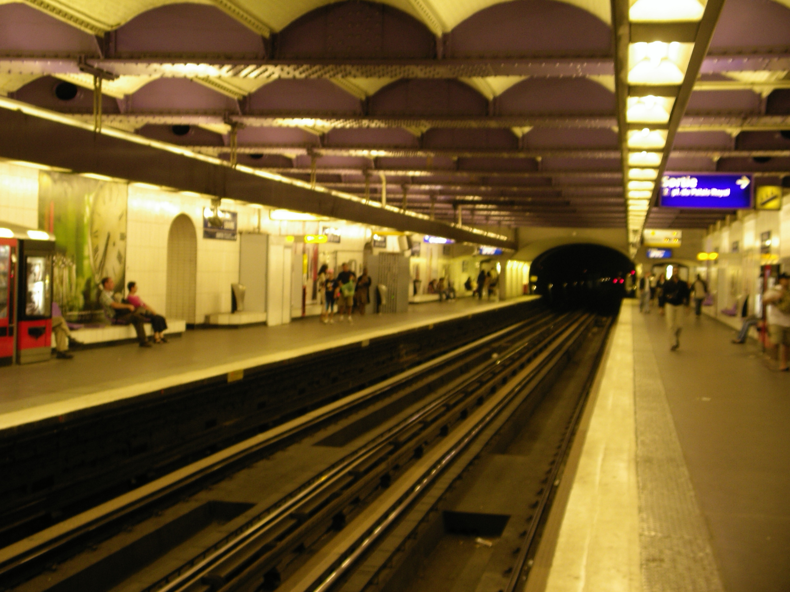 zelfgemaakte foto